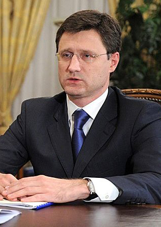 Министр энергетики России Александр Новак